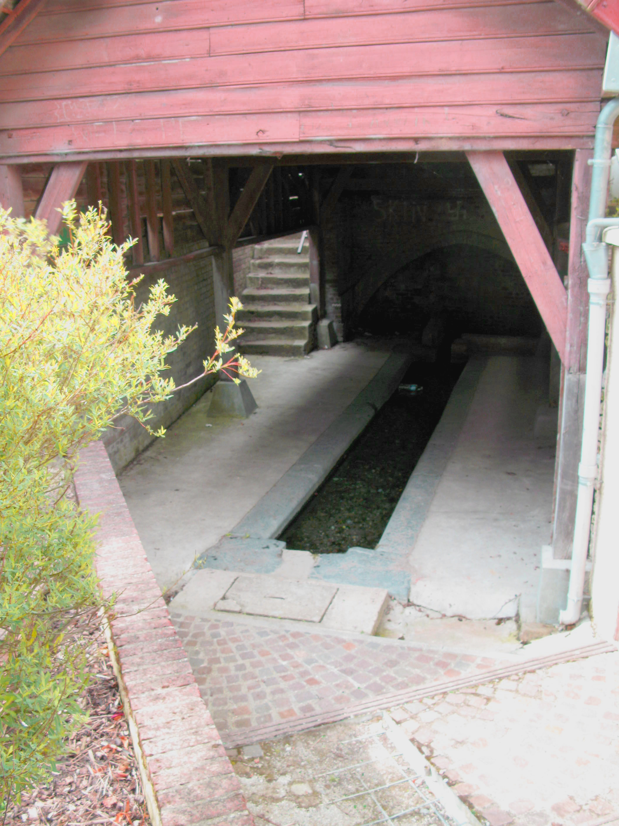 Bray-sur-Somme (Somme, France) - L'un des 2 lavoirs du XVIII° siècle.